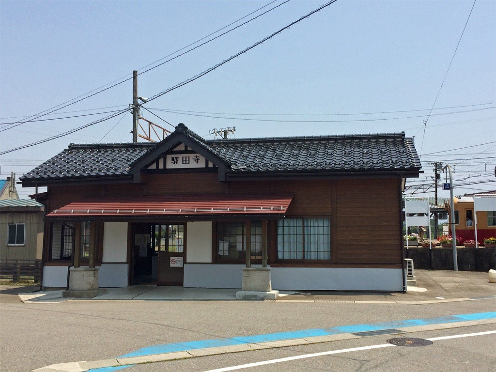 富山地方鉄道 寺田駅駅舎